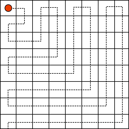 Зигзагообразный порядок обхода пикселей в стеганографическом методе Куттера-Джордана-Боссена